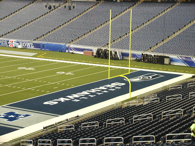 Seahawks Endzone